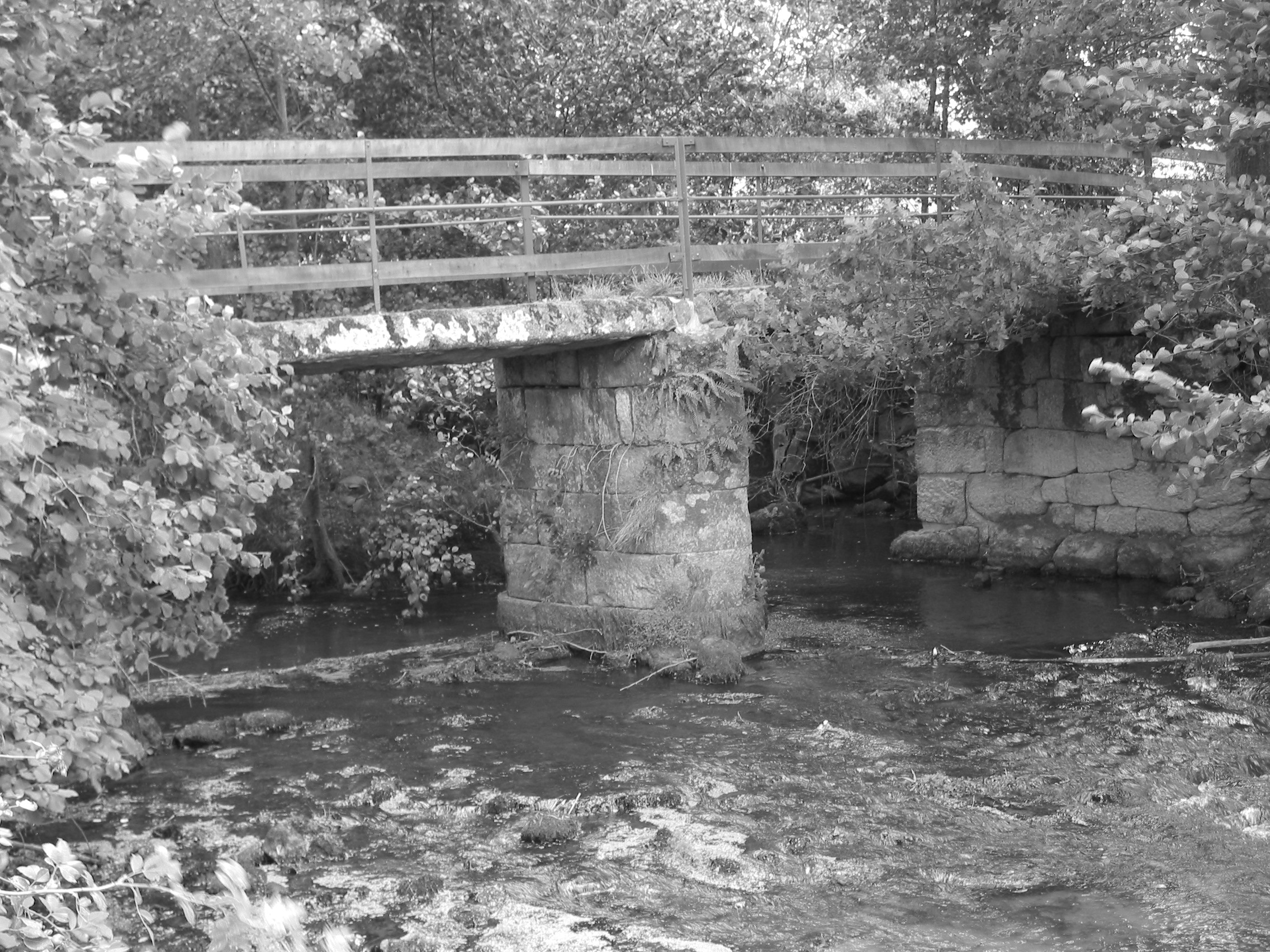 Pont à péage construit aux 16e et 17e siècles. La commune compte quatre ponts construits sur le même principe. .